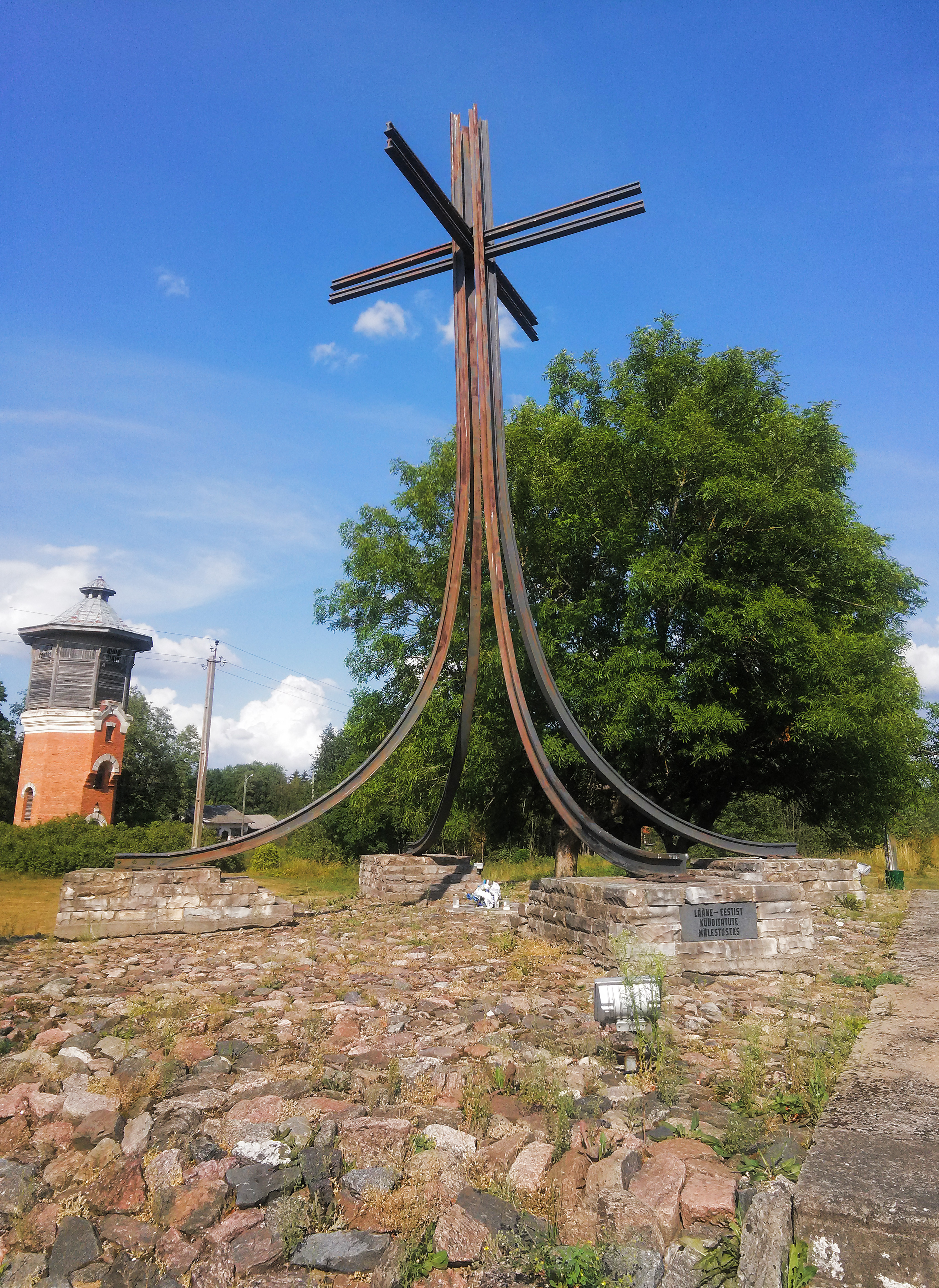 Viljar Ansko kujundatud mälestusmärk “Raudteerööpad mäletavad…”